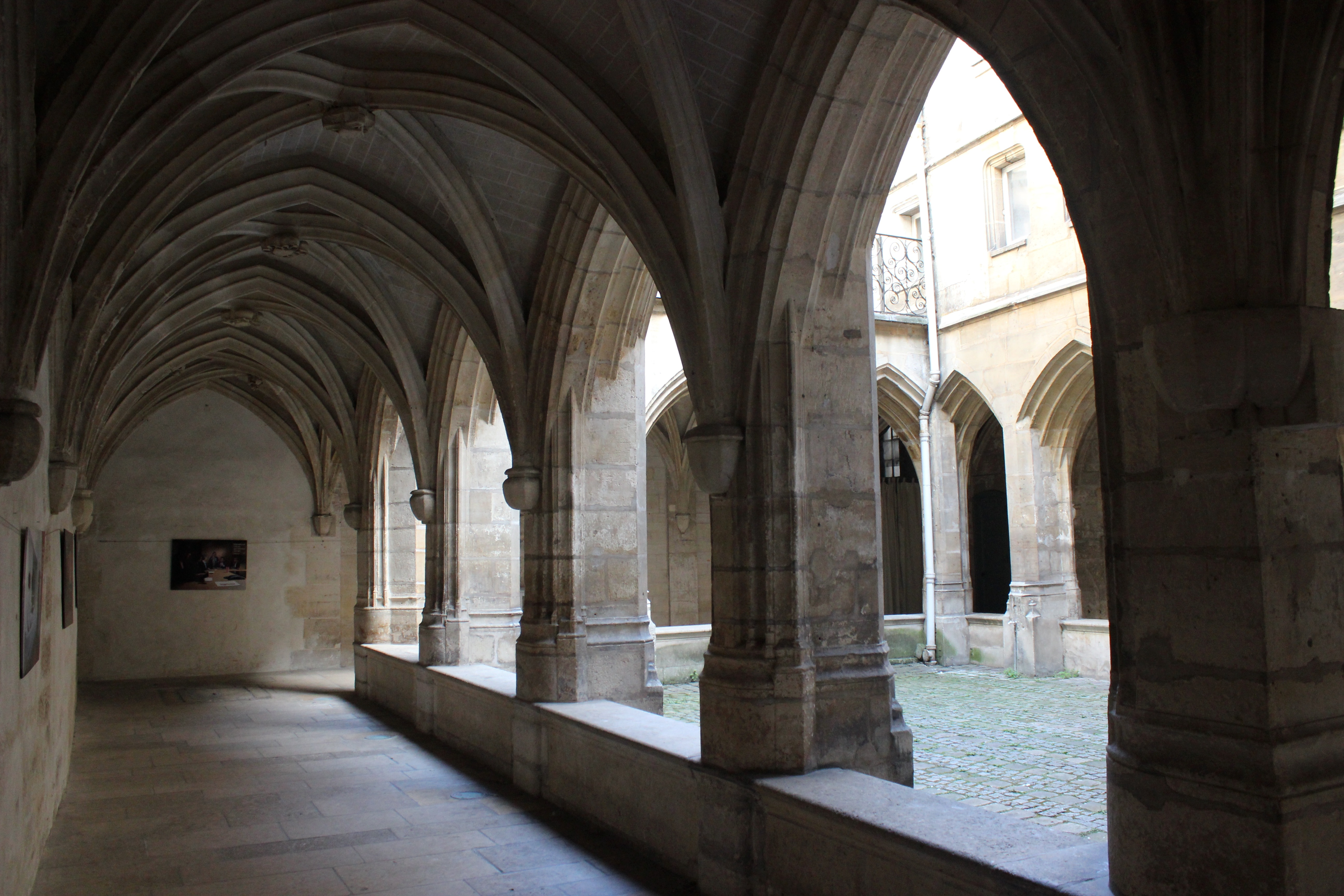 París, Église des Billettes.